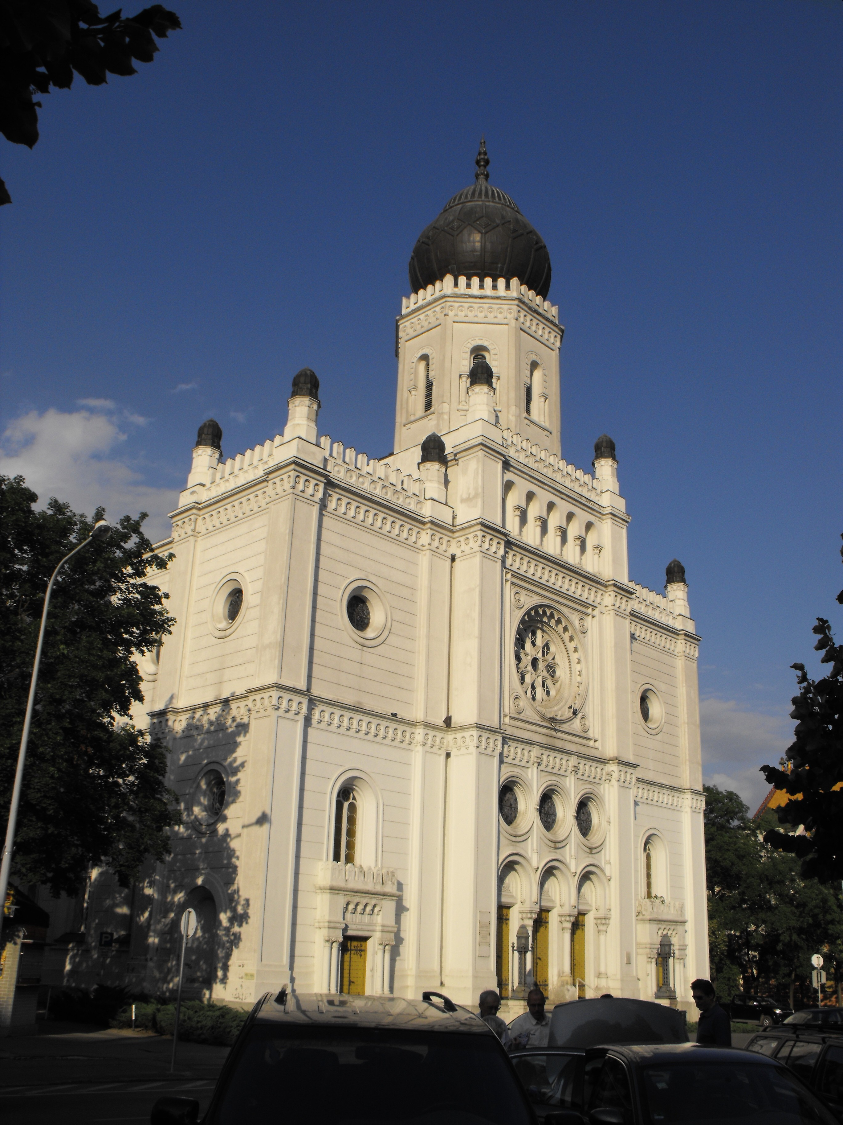 Tudomány és Technika Háza, egykori Zsinagóga. Kecskemét Hungary